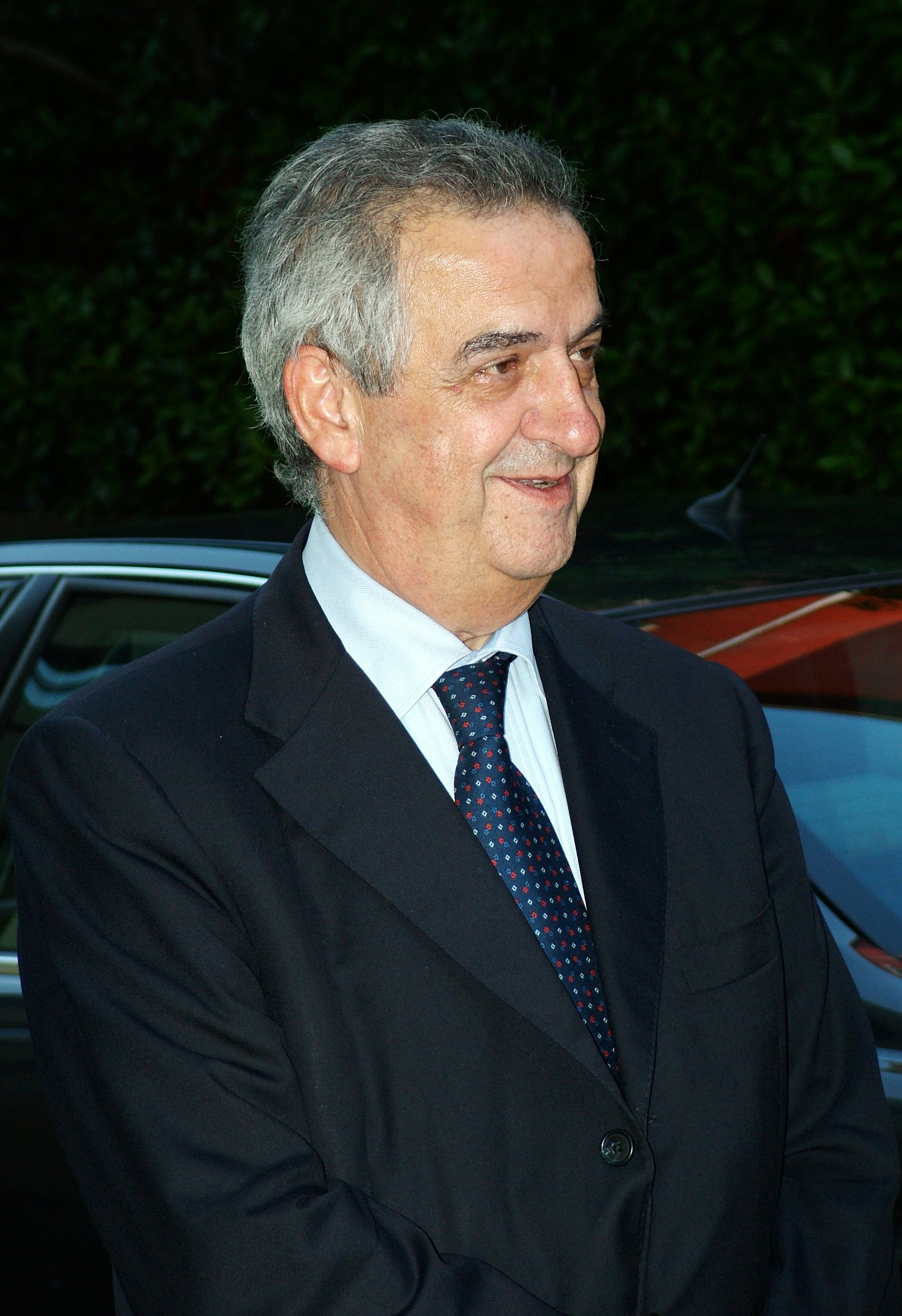 Lorenzo Ornaghi (Villasanta, 25 ottobre 1948) è un politologo italiano. Dal 16 novembre 2011 è Ministro per i Beni e le Attività Culturali del governo Monti.